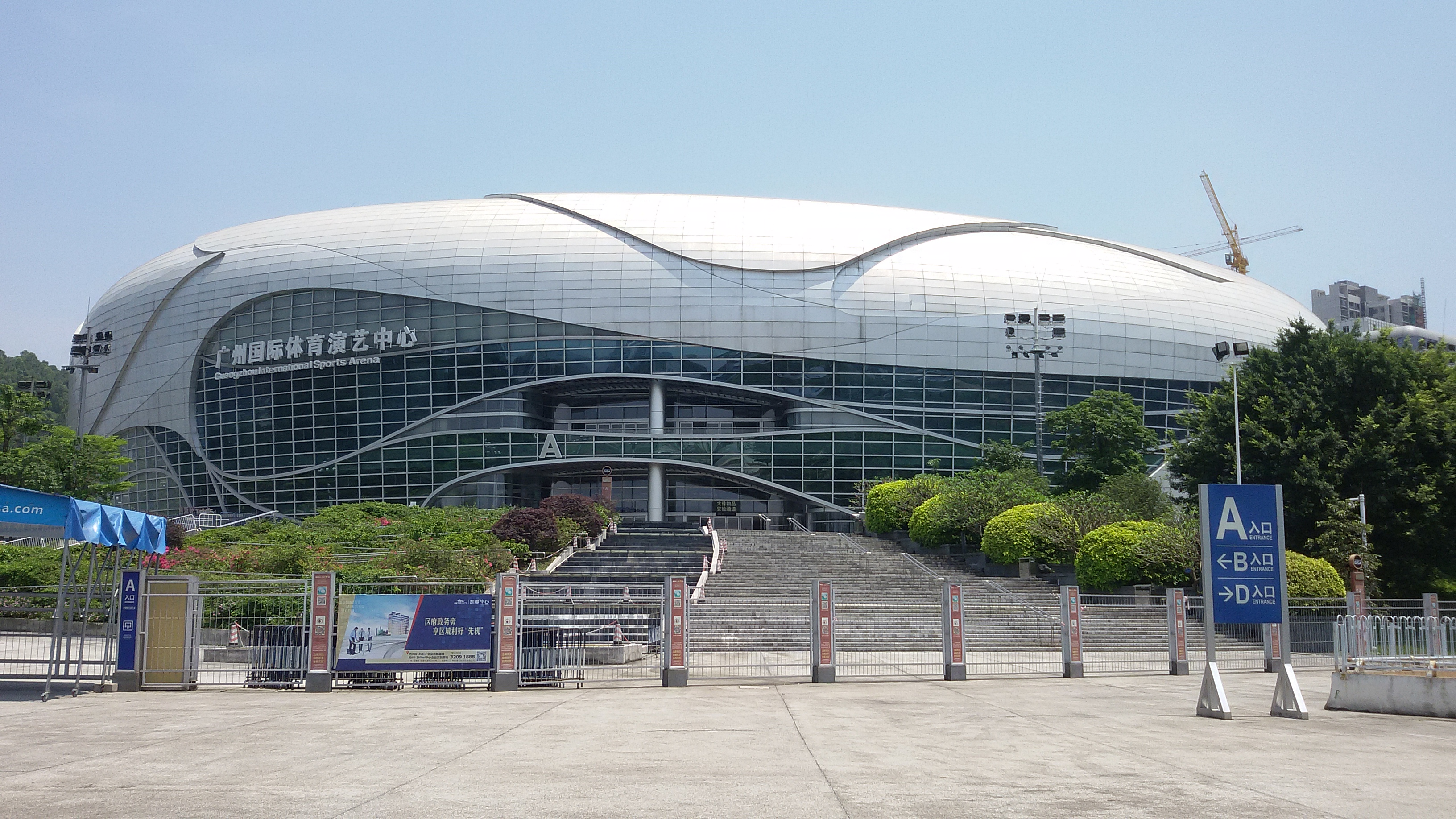 粵語: 廣州國際體育演藝中心（西南門）